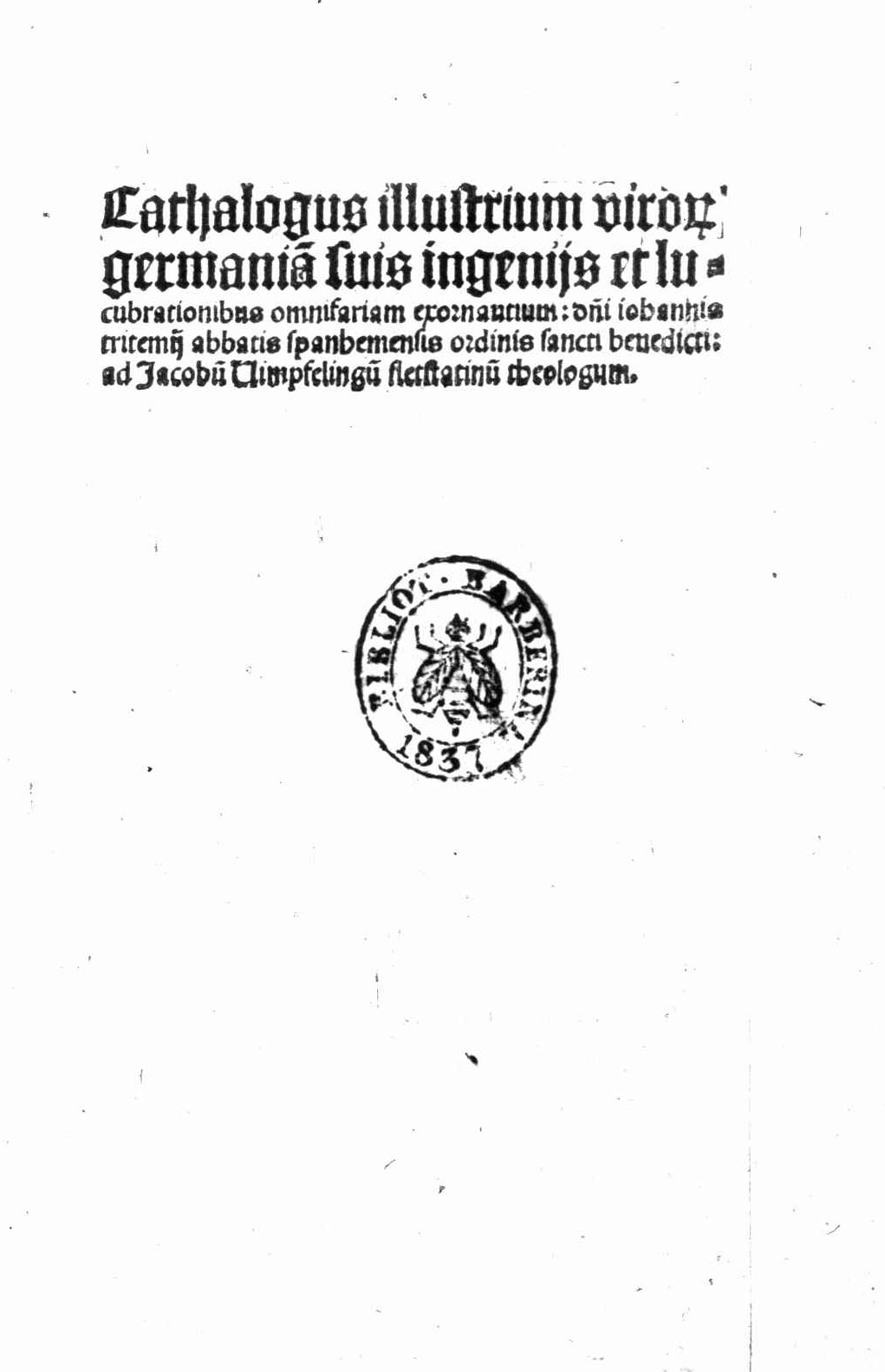 carta